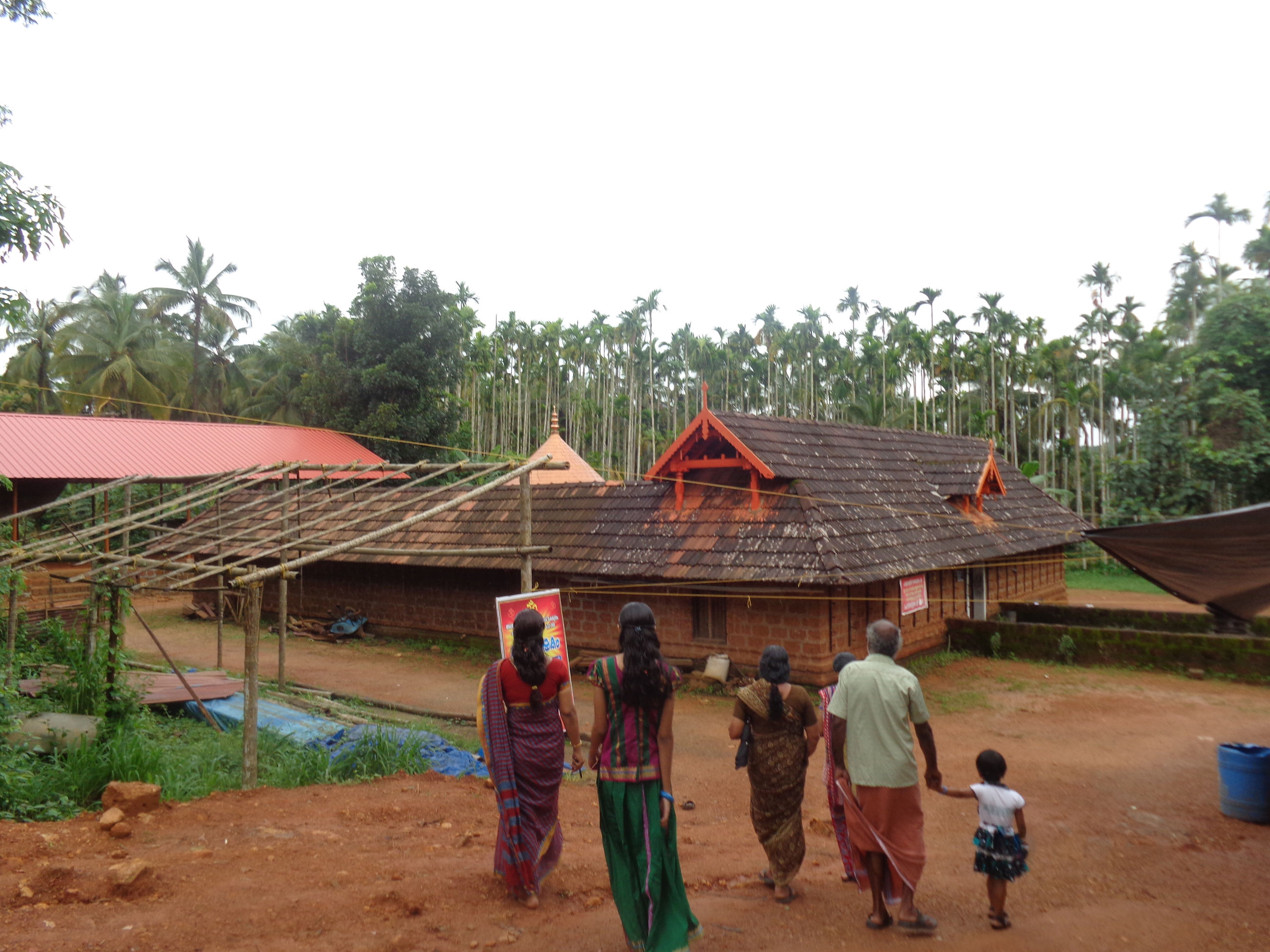 lakshmana temple ayodhya, malappuram